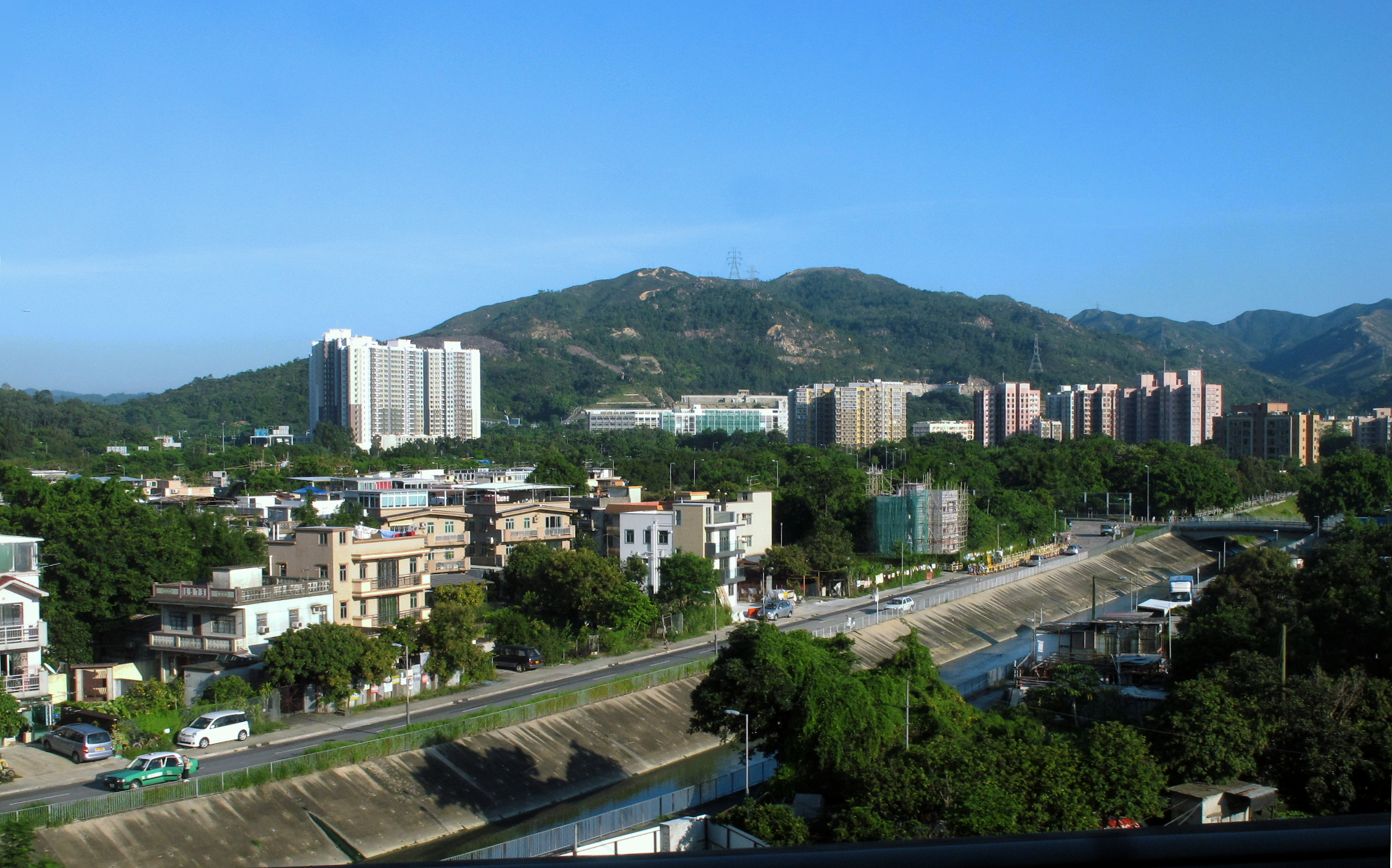 Hung Shui Kiu 洪水橋